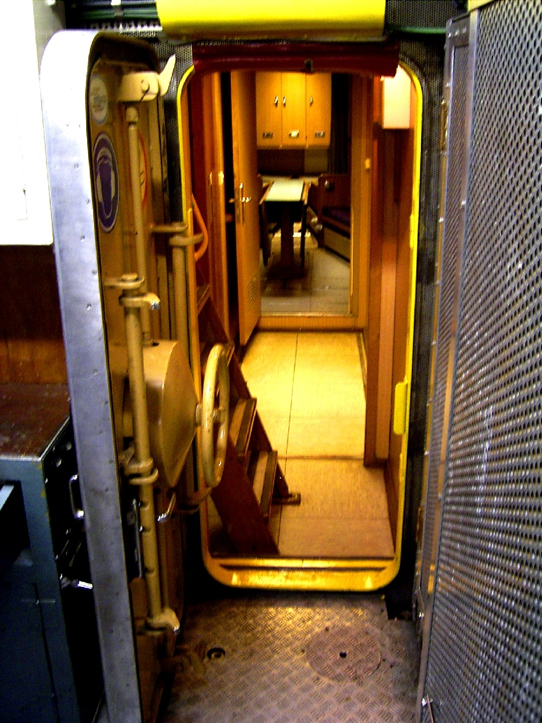 Luke im wasserdichten Schott zwischen Maschinenraum und vorderem Wohnbereich des Zollkreuzers "Oldenburg". Die Verschlüsse werden durch ein zentrales Handrad geschlossen.